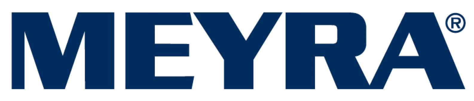 Unternehmenslogo der Meyra GmbH